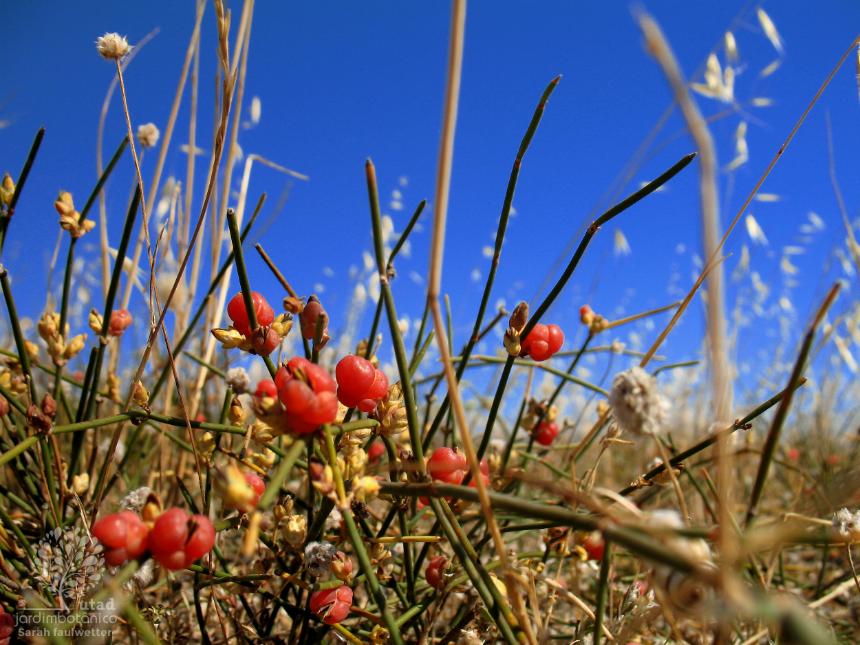 imagem da espécie Ephedra distachya subesp. distachya